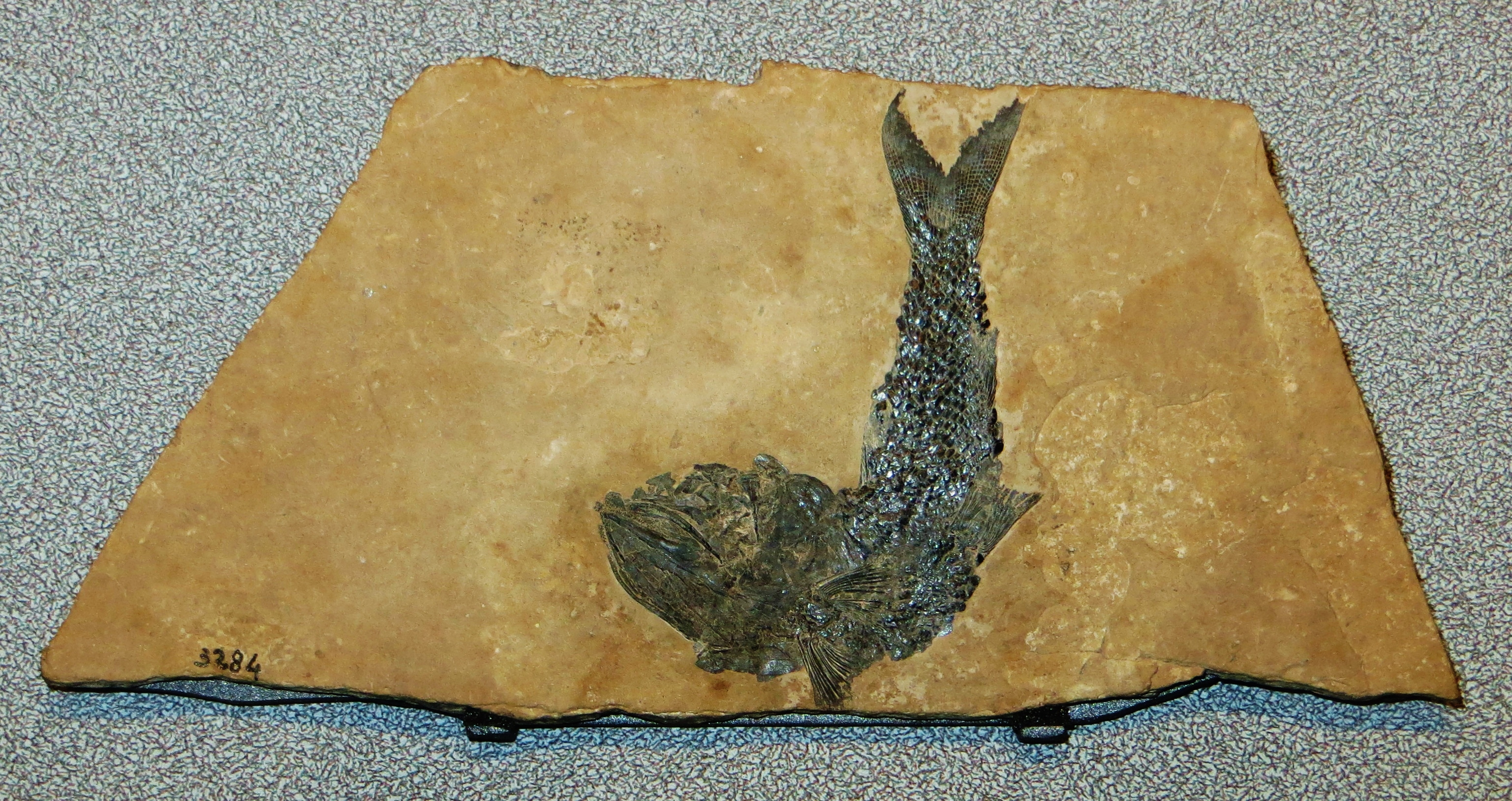 Fossil of Pholidorhynchodon, an extinct fish- Took the picture at Museo di Scienze Naturali, Bergamo